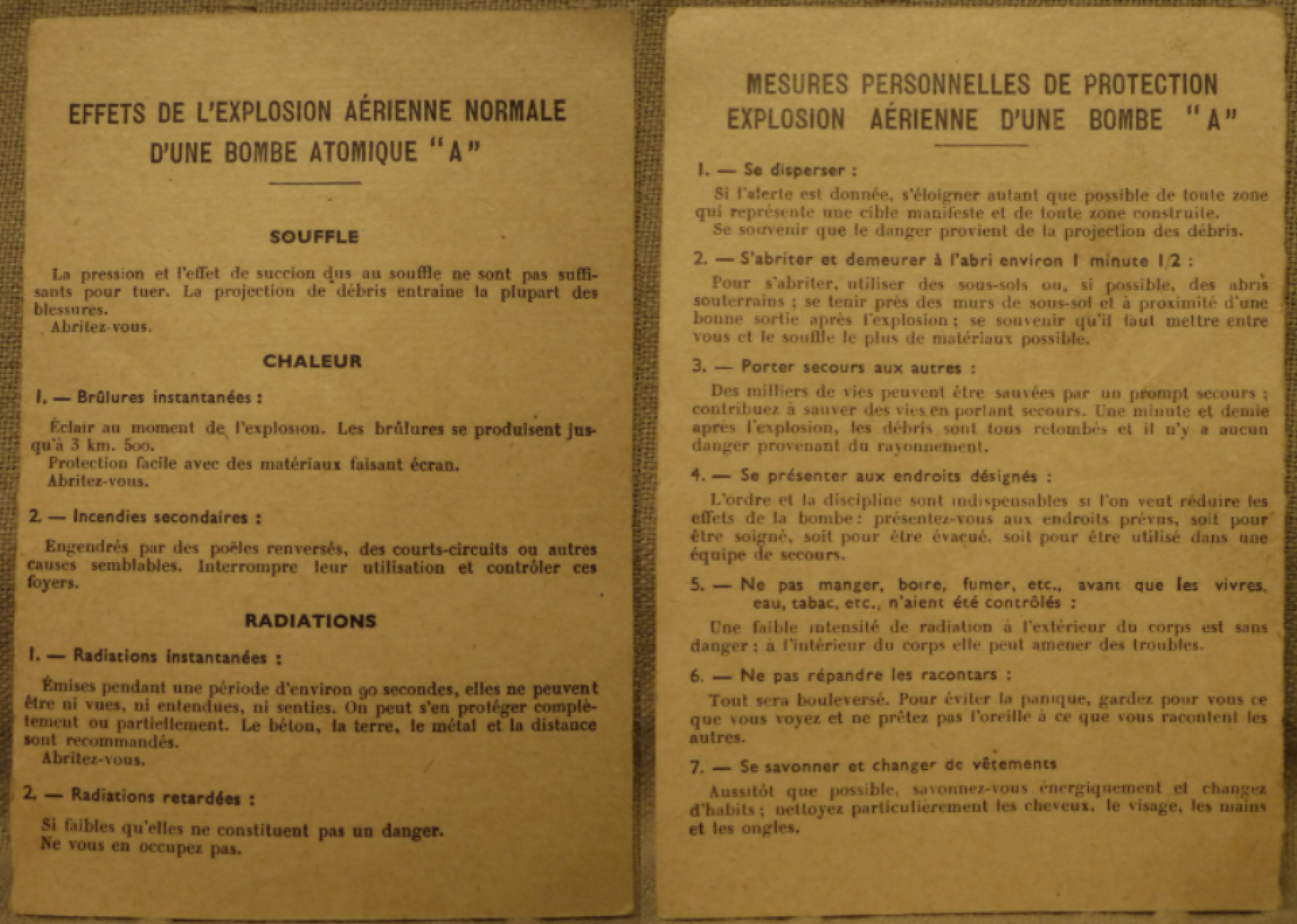 Effets de l'explosion aérienne d'une bombe A et mesures de protection